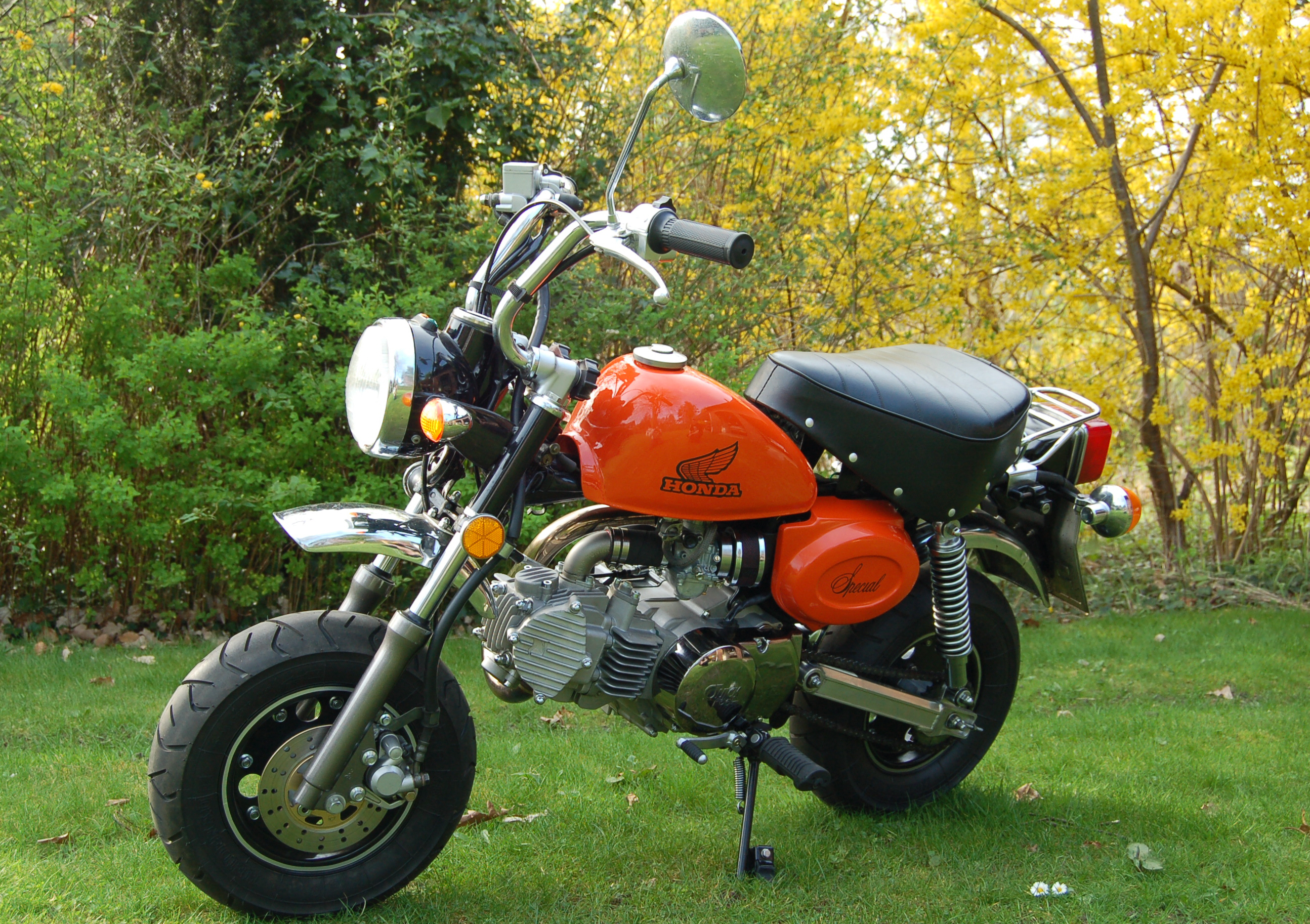 Honda Gorilla Z50J mit 160 ccm 4-Taktmotor und Monkey Tank, Baujahr 1985